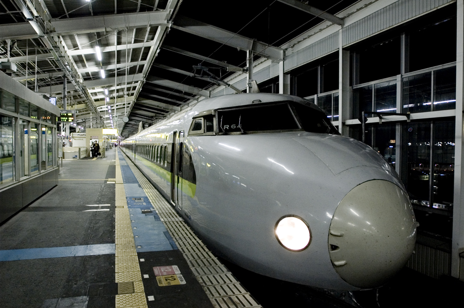 Kodama 0 series Shinkansen Okayama Station